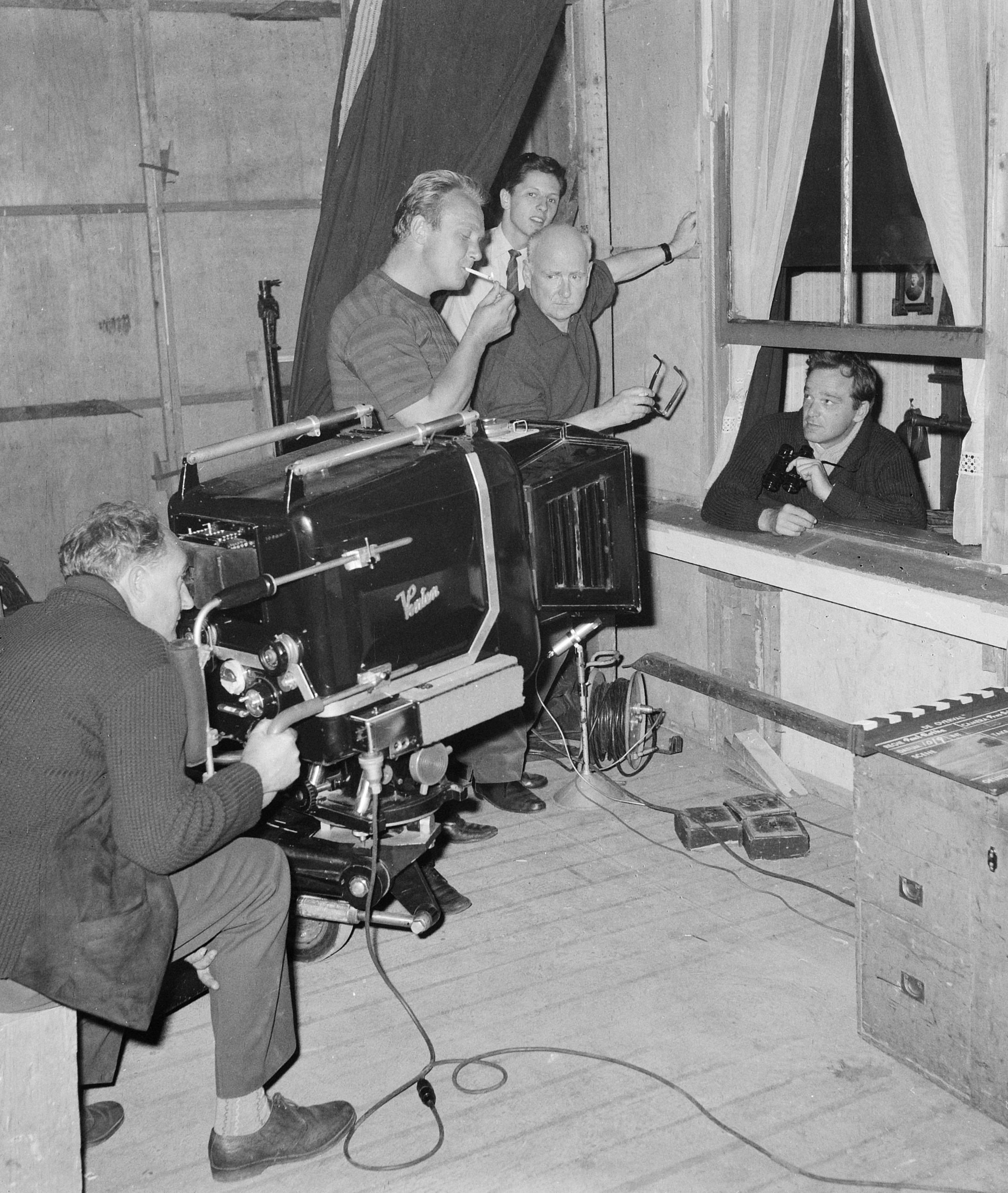 De overval in de Cinetonestudio begonnen, achter de camera Prosper Dekeukeleire, Kees Brusse, Paul Rotha, in het raam Jan Blaaser